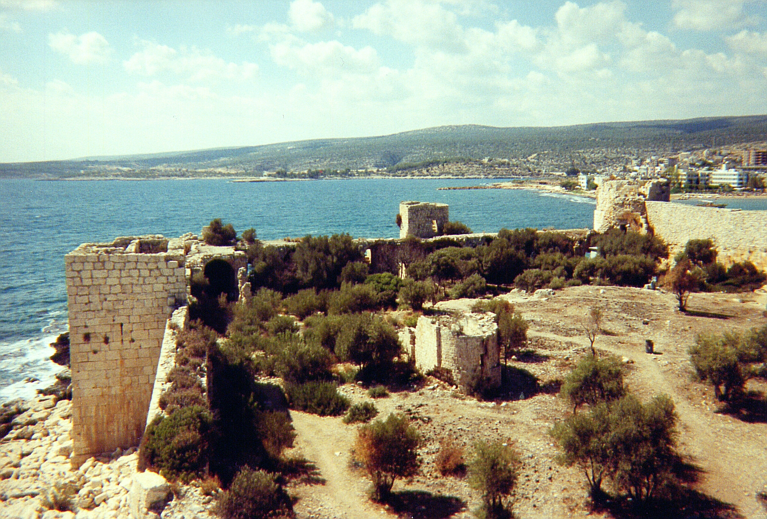 Kizkalesi, Südtürkei, Mädchenburg vom Ostturm